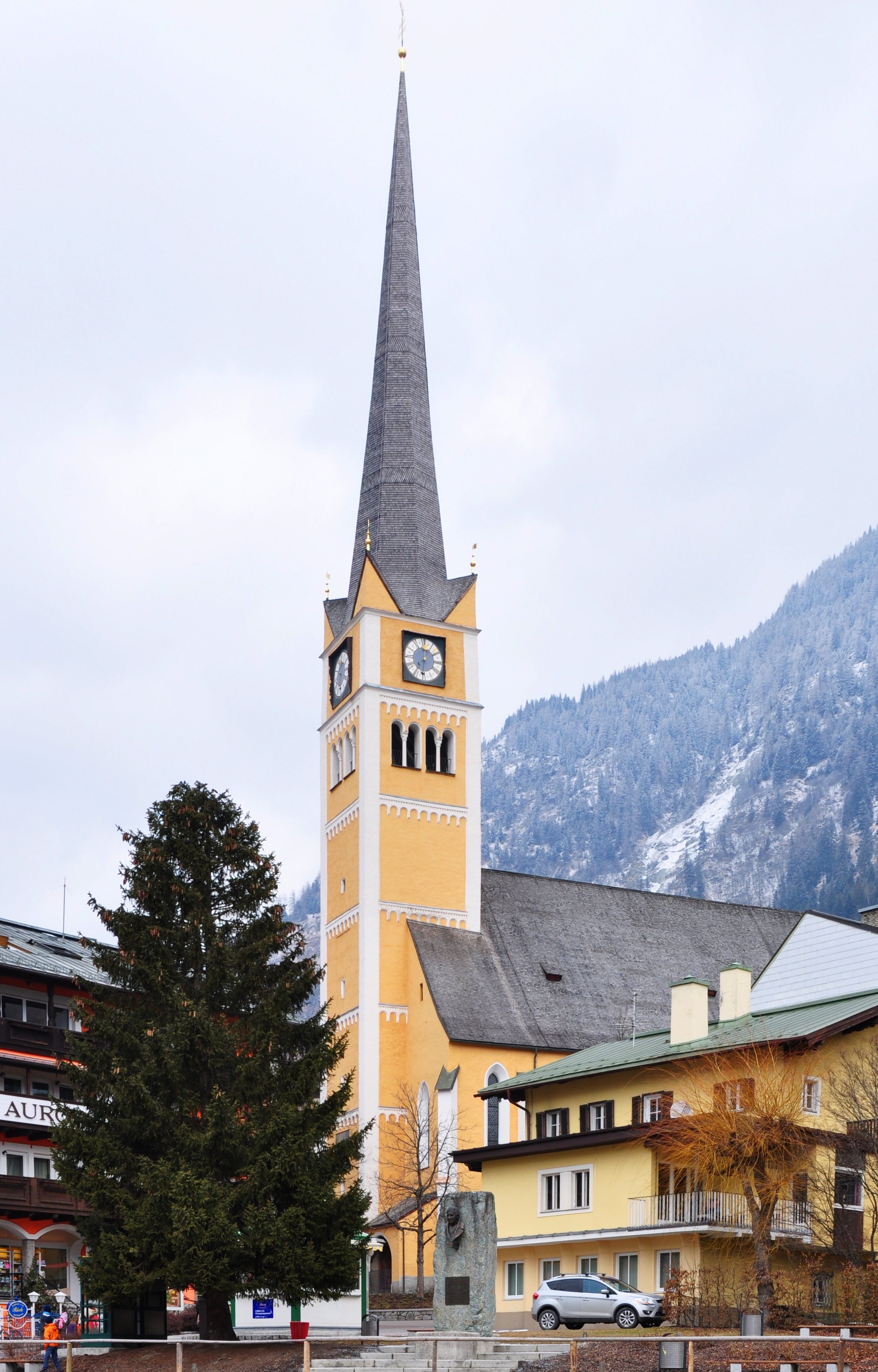 Pfarrkirche in Bad Hofgastein